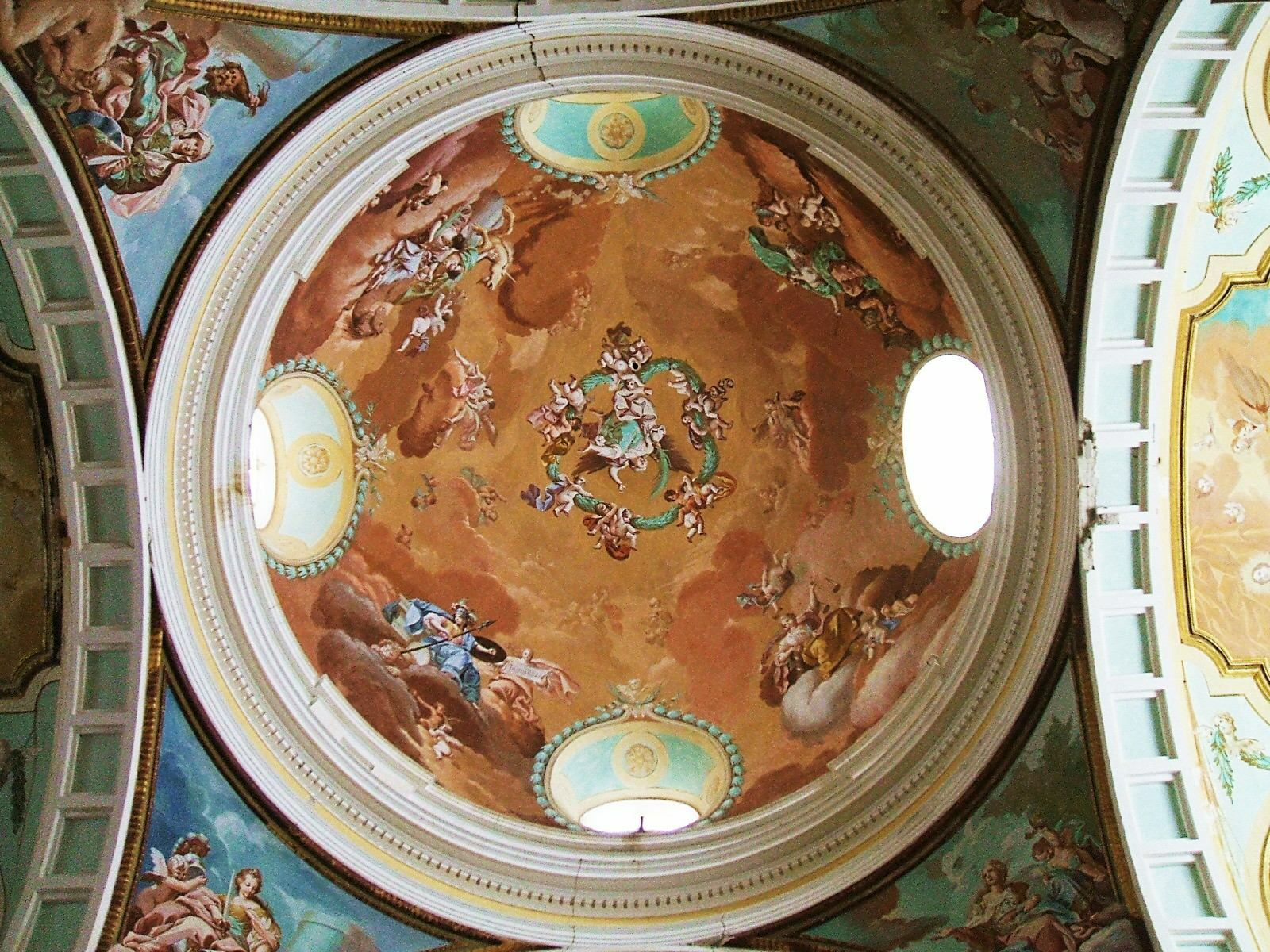 Bóveda del crucero de la iglesia de la Cartuja de Nuestra Señora de las Fuentes (Cartuja de Monegros), en el término municipal de Sariñena, Huesca, Aragón, España.